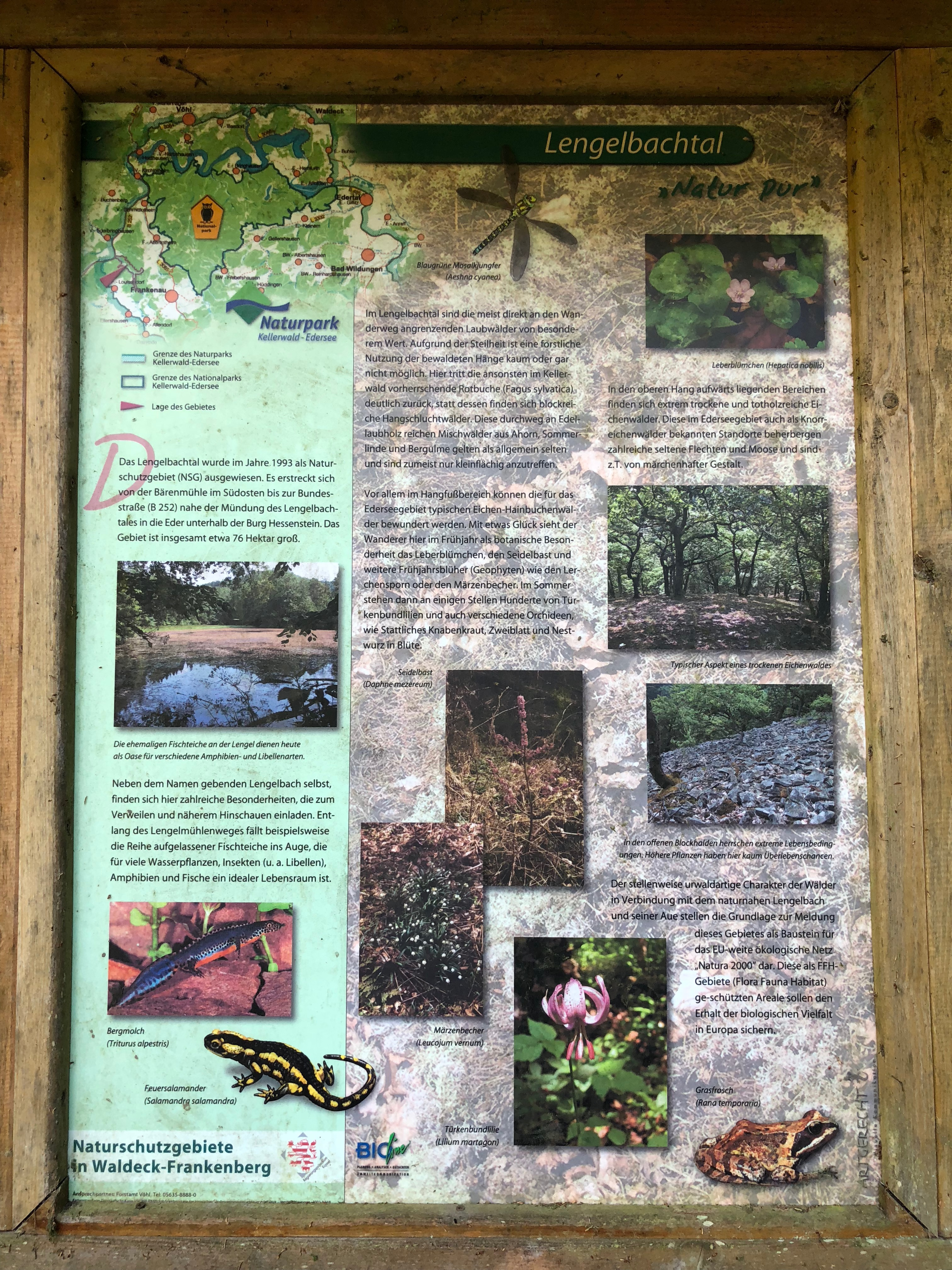 Bilder zwischen der Mündung des Lengelbach und der Huhnsmühle.